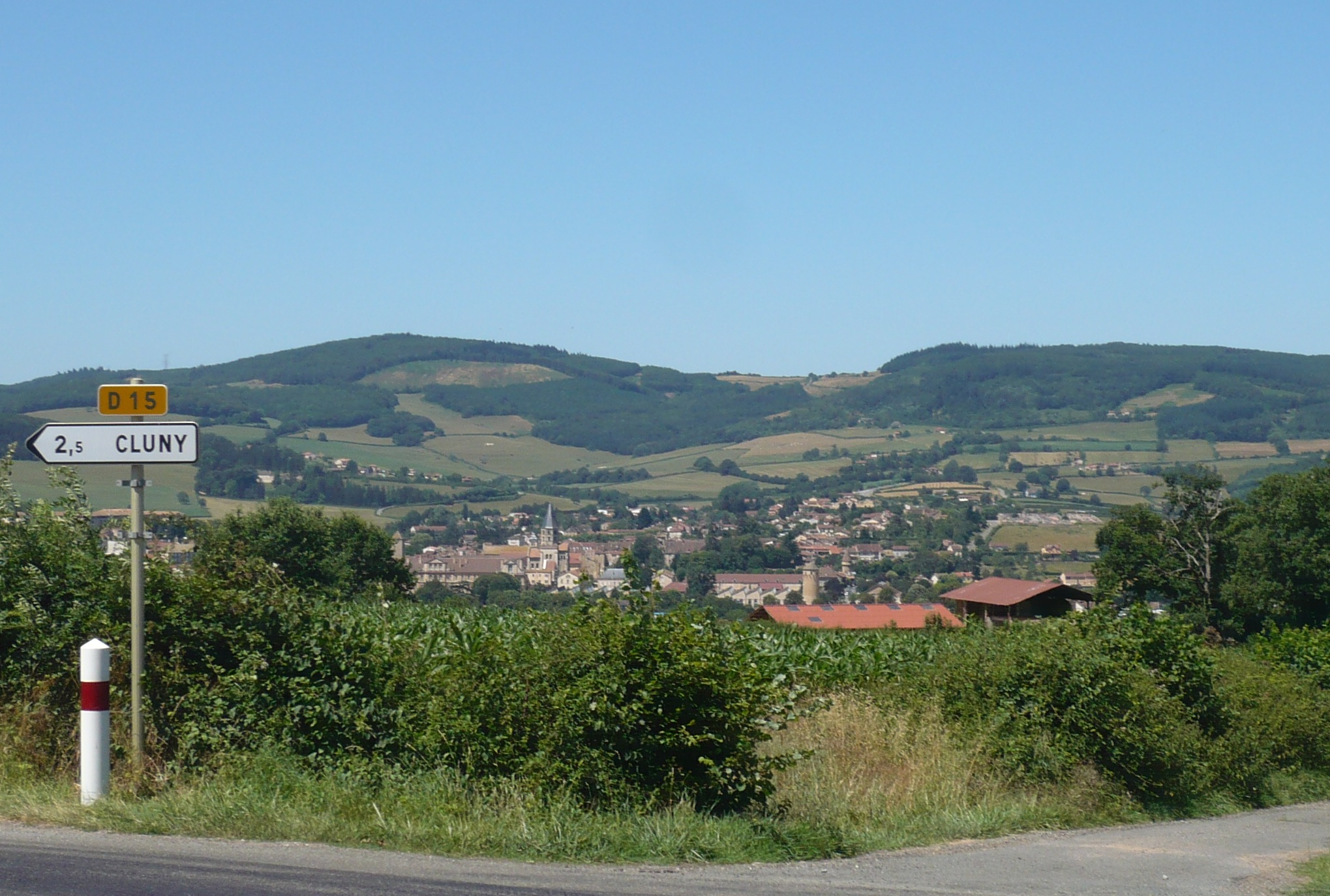 Cluny